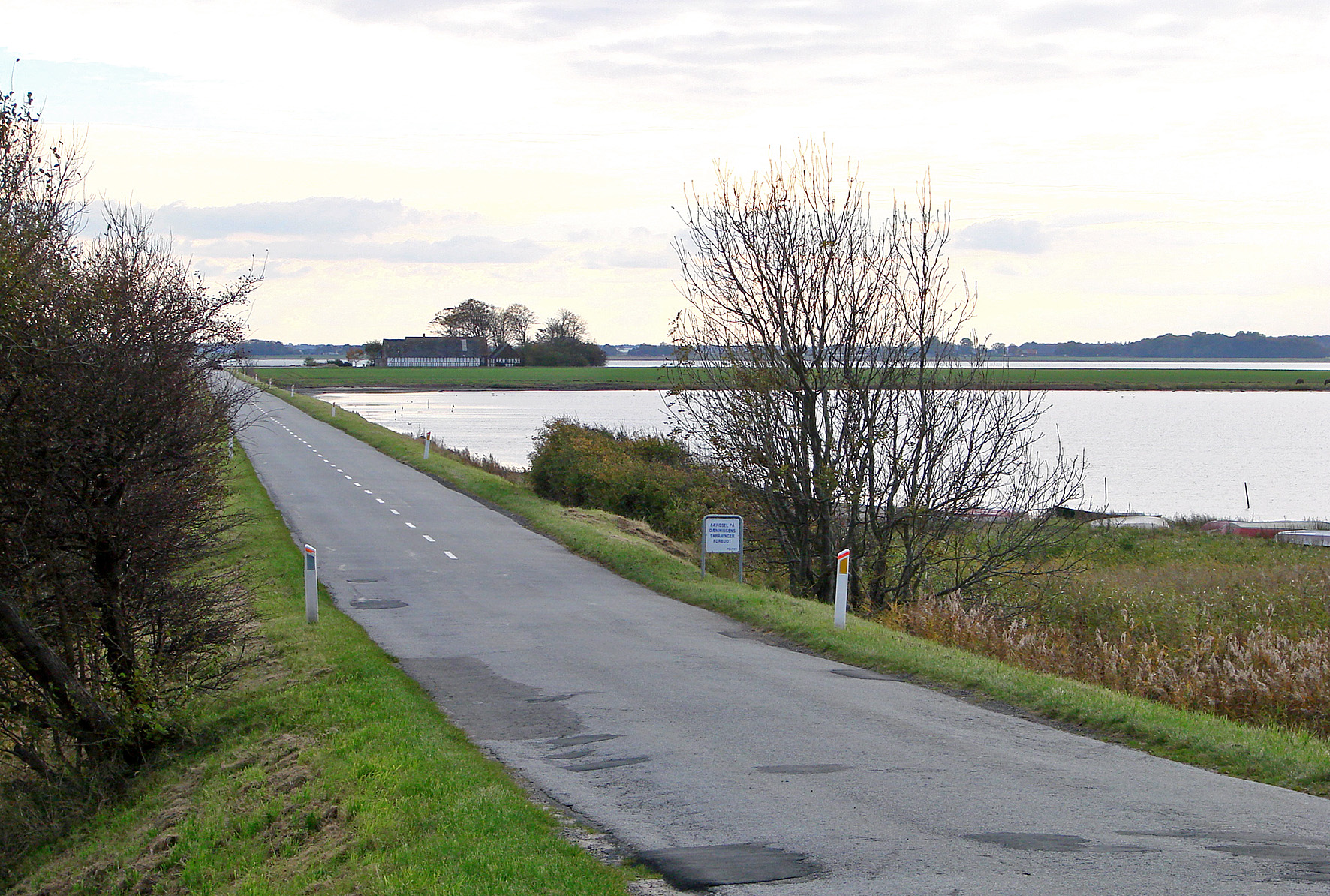 Dæmningen til Alrø i Horsens Fjord